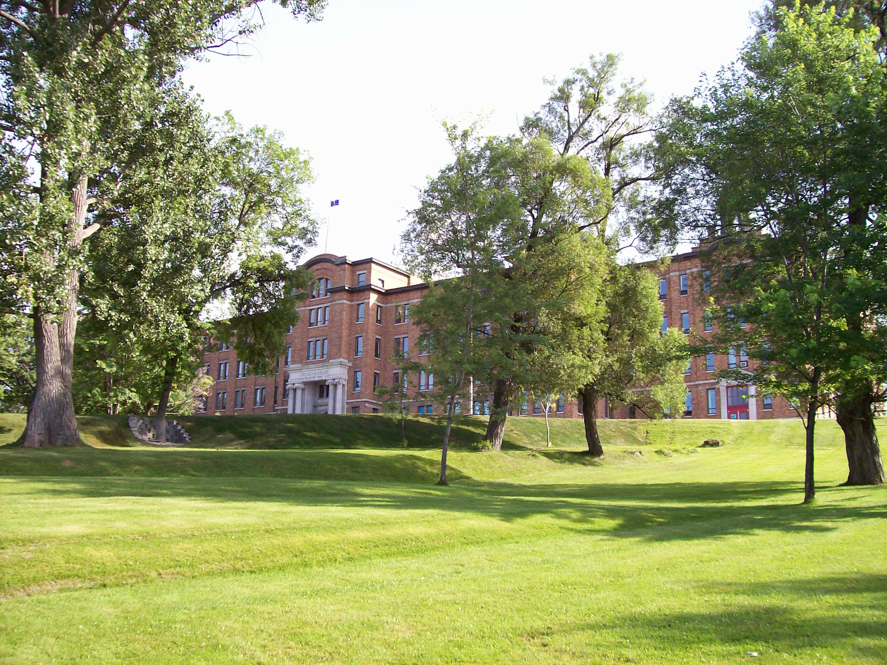 Vue du Cégep de Chicoutimi, QUébec, Canada. Entrée de l'ancien séminaire.